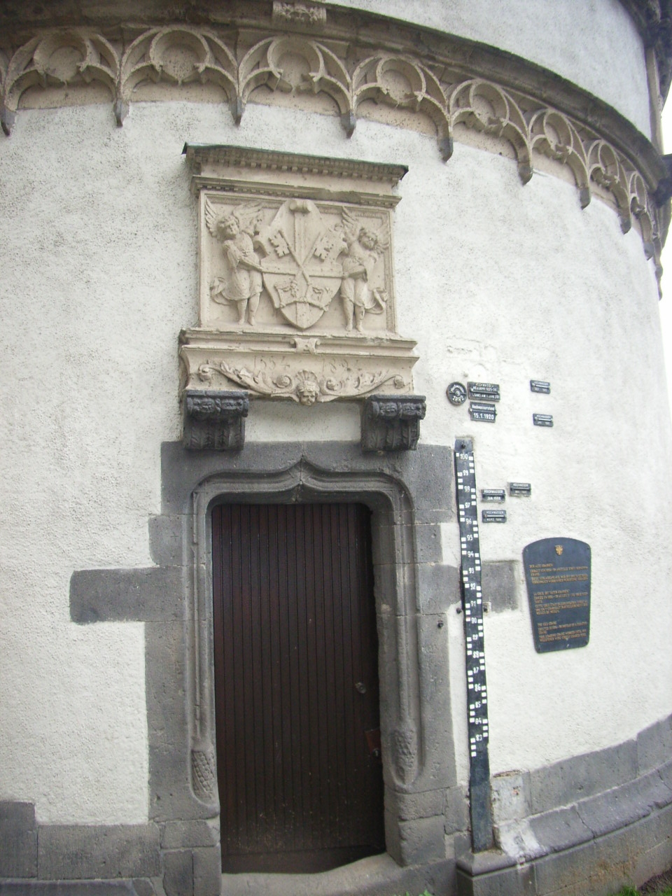 Alter Krahnen in Andernach von 1561, Haupteingangstür mit Tuffsteinstadtwappen